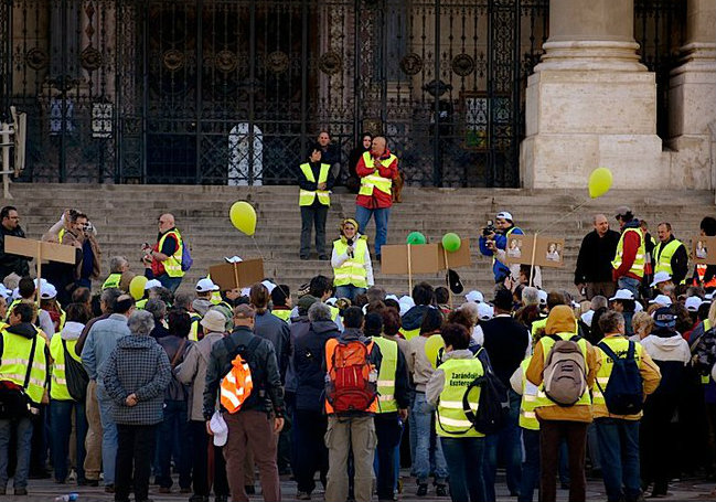 Zarándoklat Esztergomért, Tétényi Éva, 2011. 04. 09.